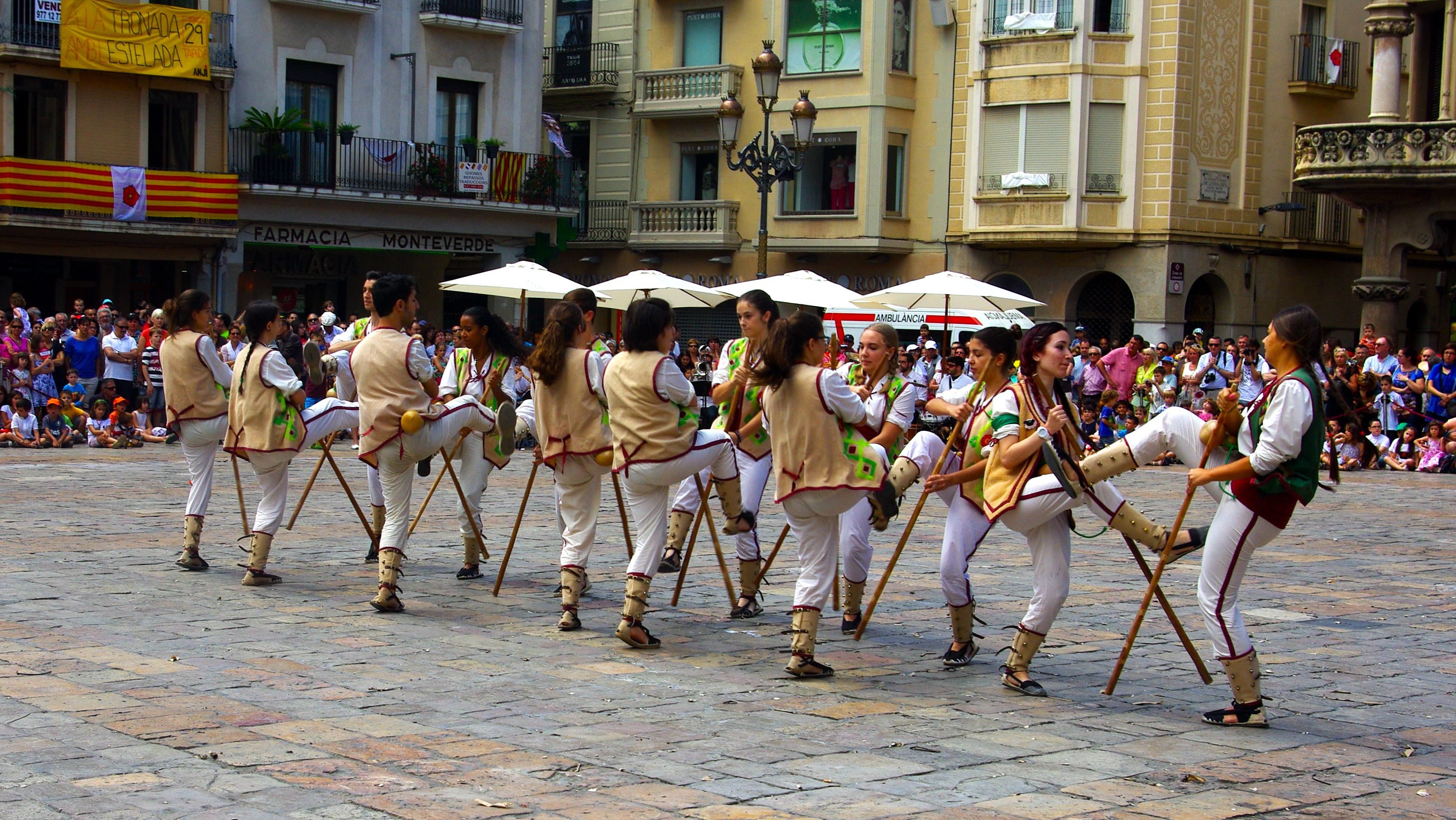 Ball de Pastorets al Mercadal. Sant Pere 2014